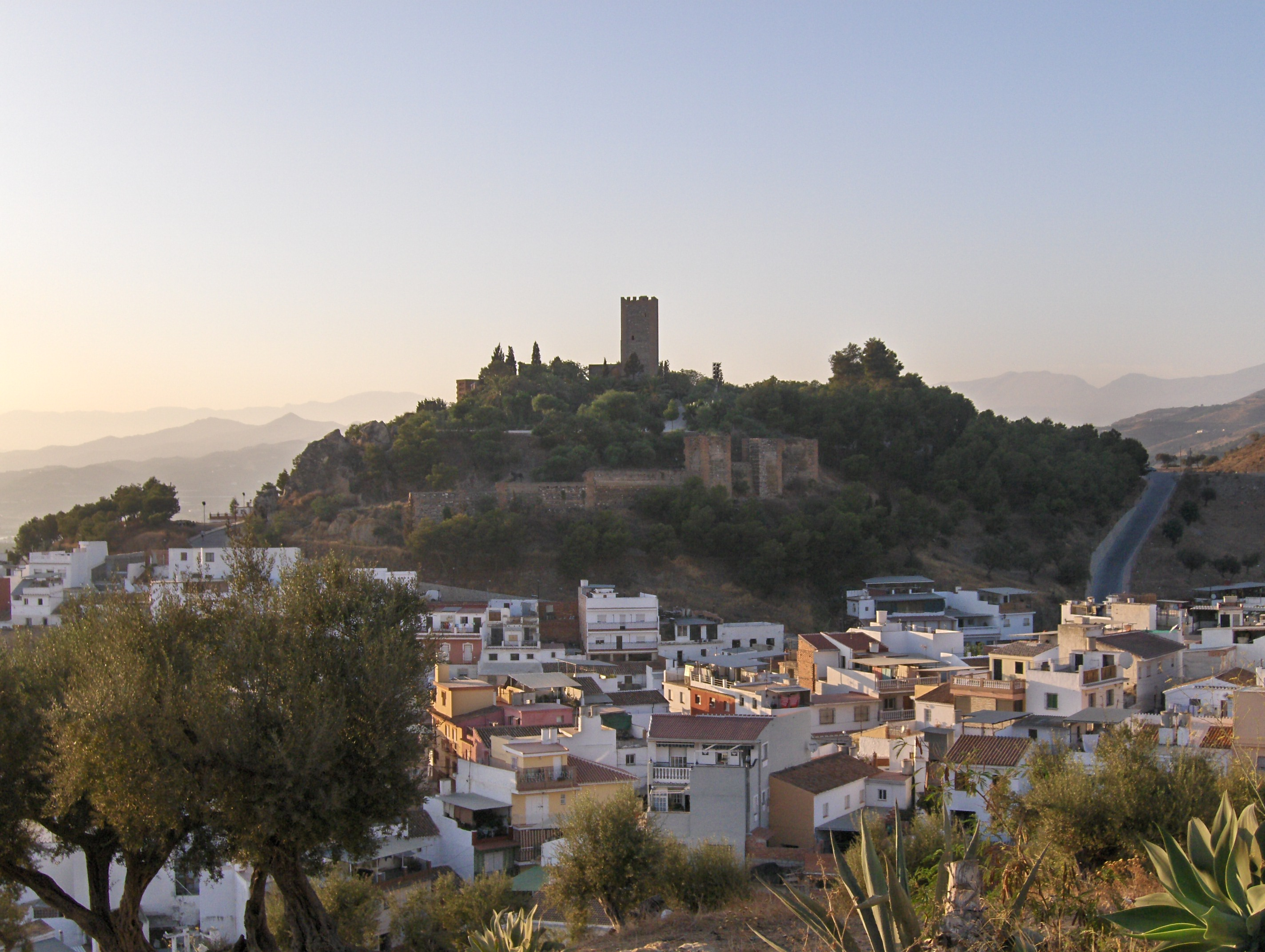 Castillo de Vélez-Málaga, España. Vista desde el Cerro de los Remedios